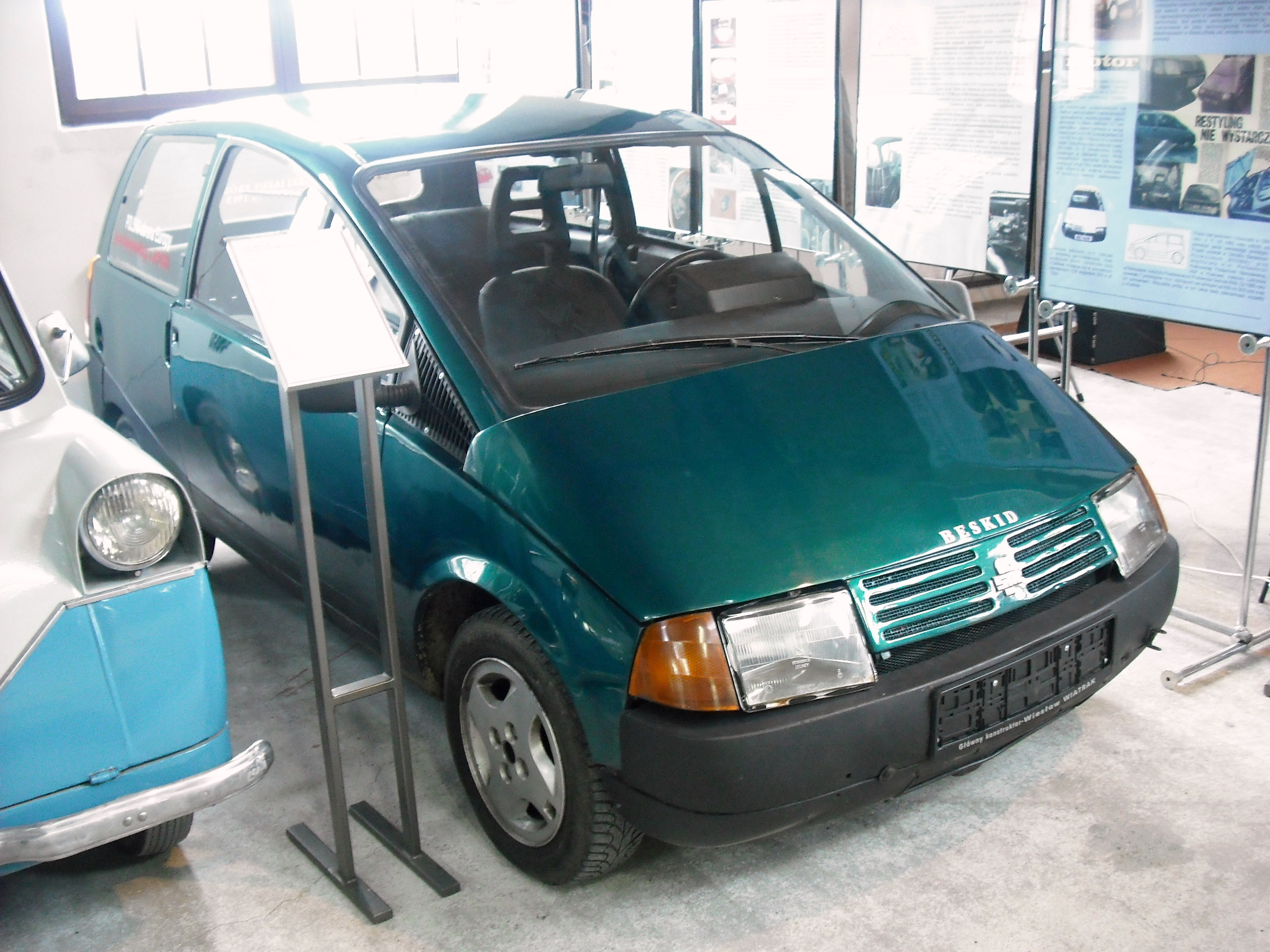 Samochód Beskid w Muzeum Inżynierii Miejskiej w Krakowie